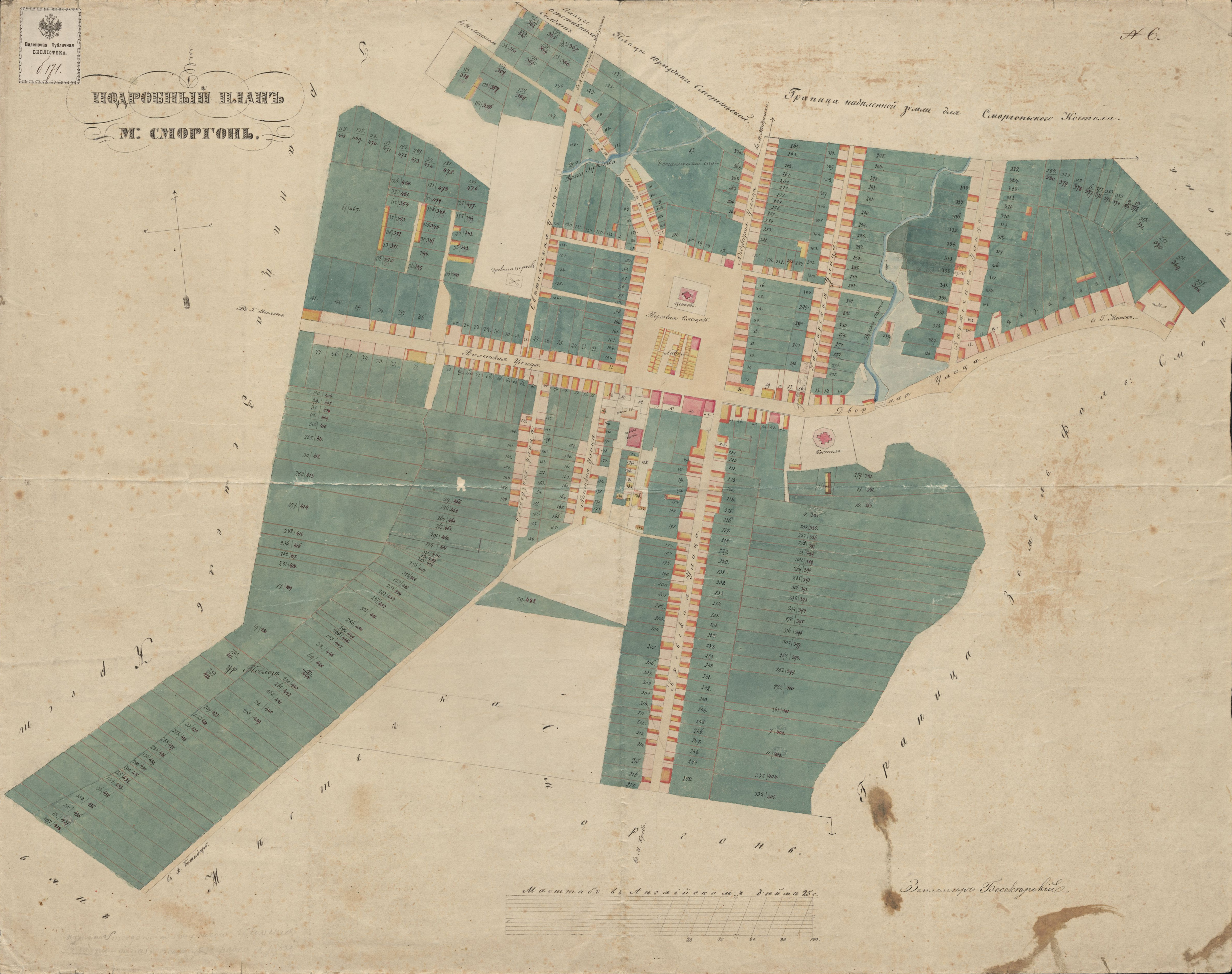 Беларуская (тарашкевіца): Смаргонь (Smarhoń). Плян